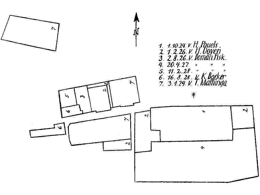 Grunderwerb für das Gelände der Schule am Meer im Loog auf Juist nach dem Stand von 1929. Der Plan visualisiert den Erwerb bzw. Zukauf von Grundstücken in chronologischer Reihenfolge. Er begann bereits im Jahr vor der eigentlichen Schulgründung bzw. -eröffnung, die am 1. Mai 1925 stattfand. Zu diesem Zeitpunkt beschränkte sich der Schulbetrieb auf das ehemalige Logierhaus mit Gaststätte Tusculum (1). Die angegebenen Daten entsprechen den Daten der Kaufverträge mit den genannten Vorbesitzern. Der Großteil der markierten Grundstücke war zum Kaufzeitpunkt unbebaute Dünenlandschaft, teils mit Strandhafer und Sanddorn.